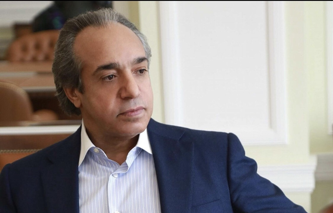 صورة شخصية